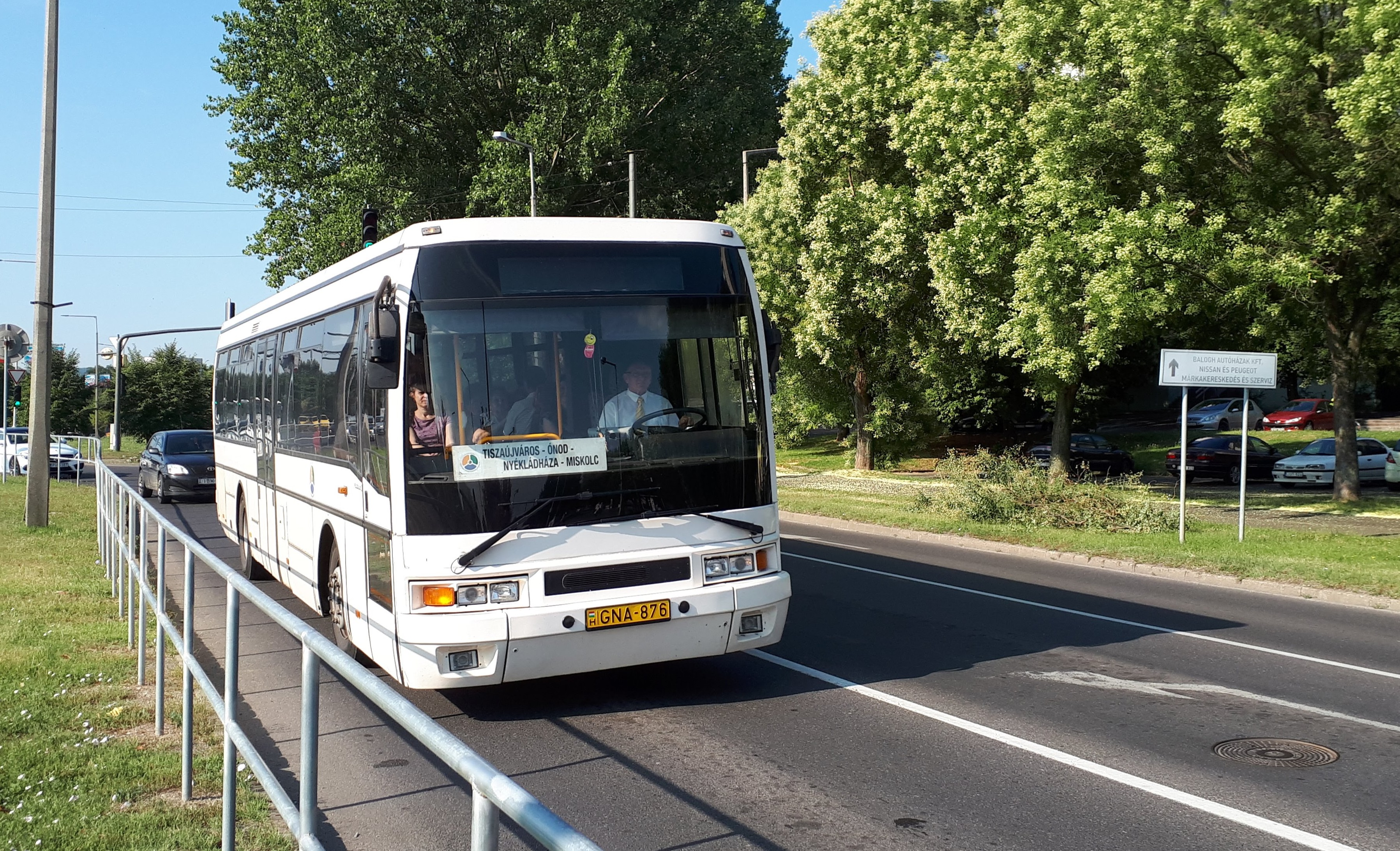 Az ÉMKK GNA-876 rendszámú Ikarus E94 típusú busza Miskolcon, a 3744-es helyközi járaton.